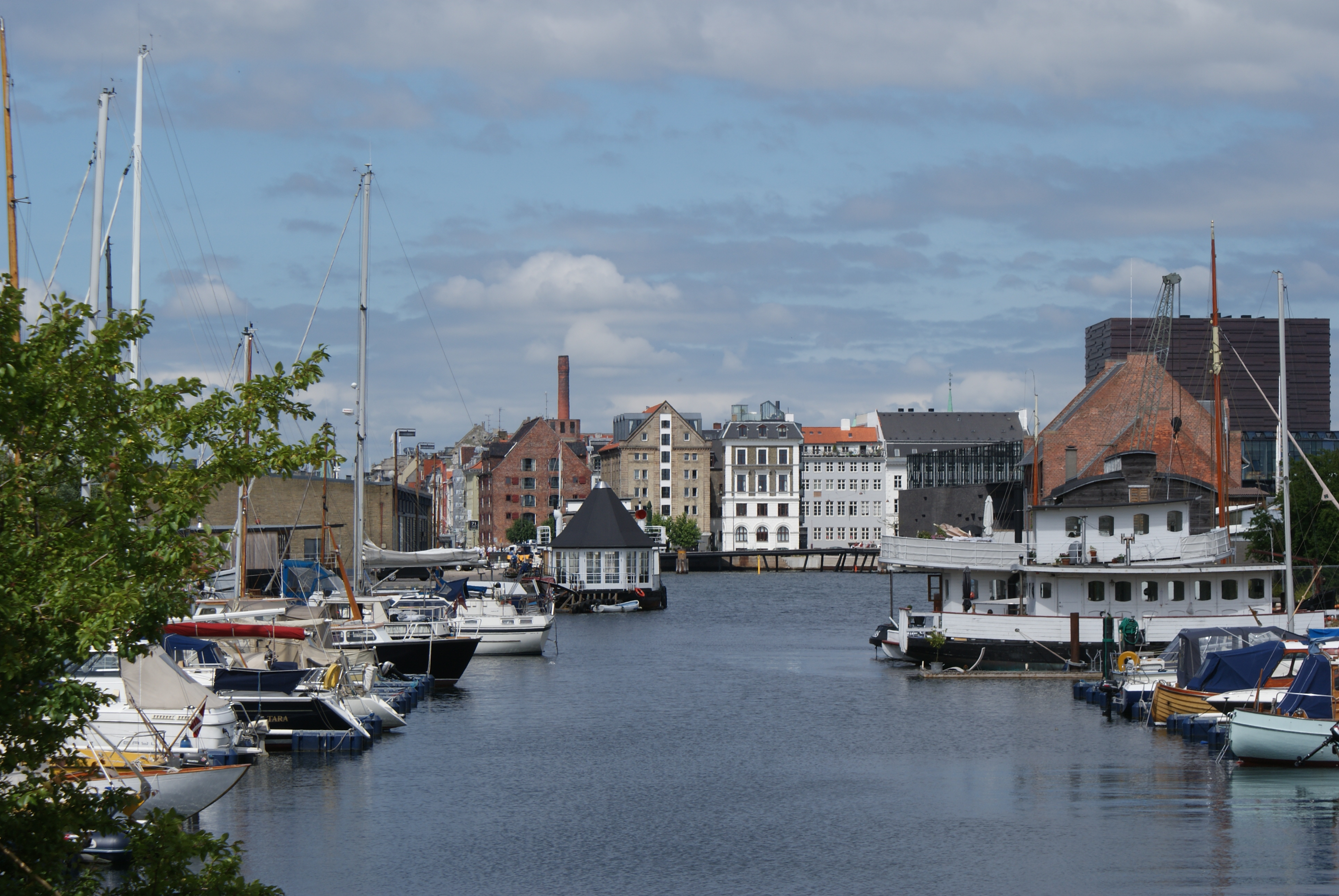 Christianshavn, Copenhagen, Denmark